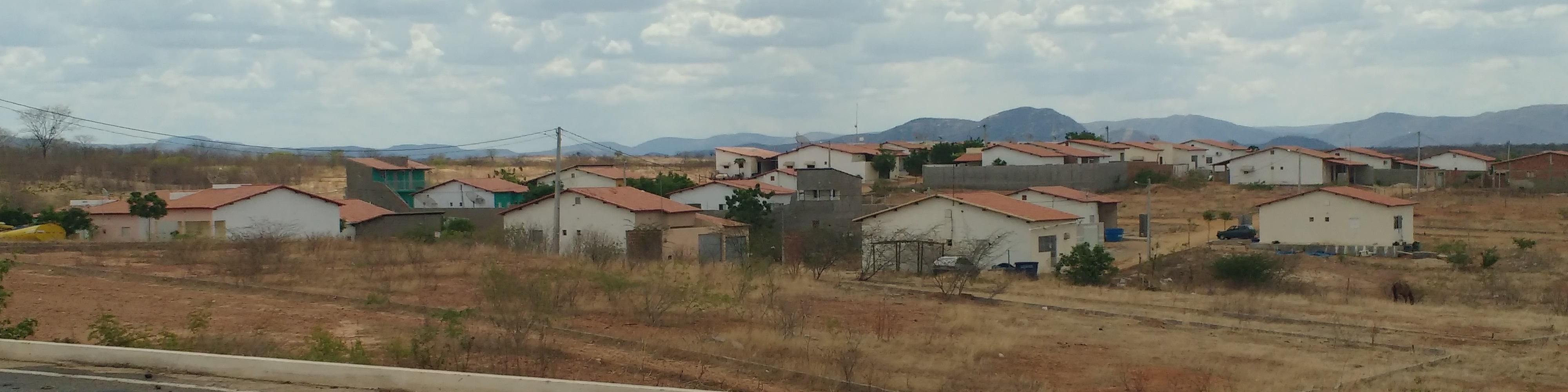 Loteamento Nova Pau dos Ferros, em Pau dos Ferros, Rio Grande do Norte (Brasil).